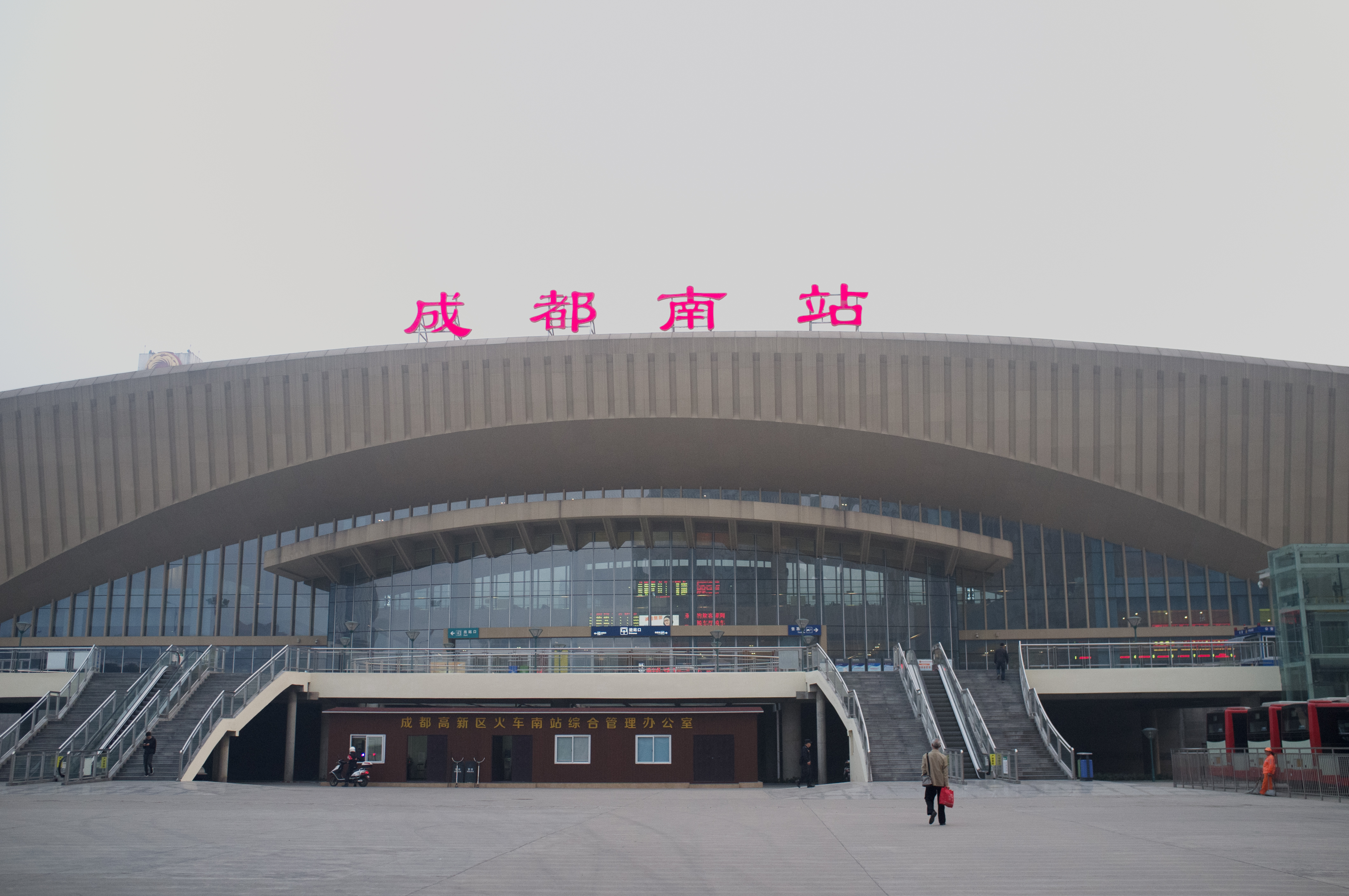 中文（中国大陆）: 成都火车南站